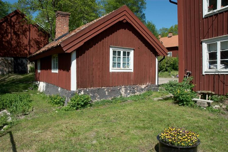 Enkelstuga. Motiv: Stora kungsladugården Nyckelord: Byggnadsminnen:Statl, Riksintressen Kategori: Bostadshus, Kungsgård/kungsladugård Enkelstuga.